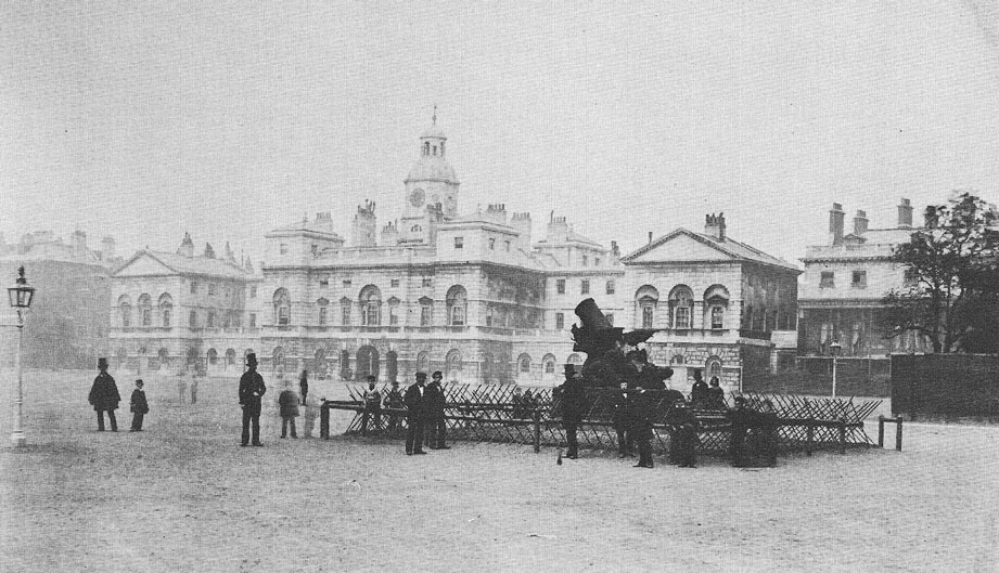 Horse Guards Parade in 1860